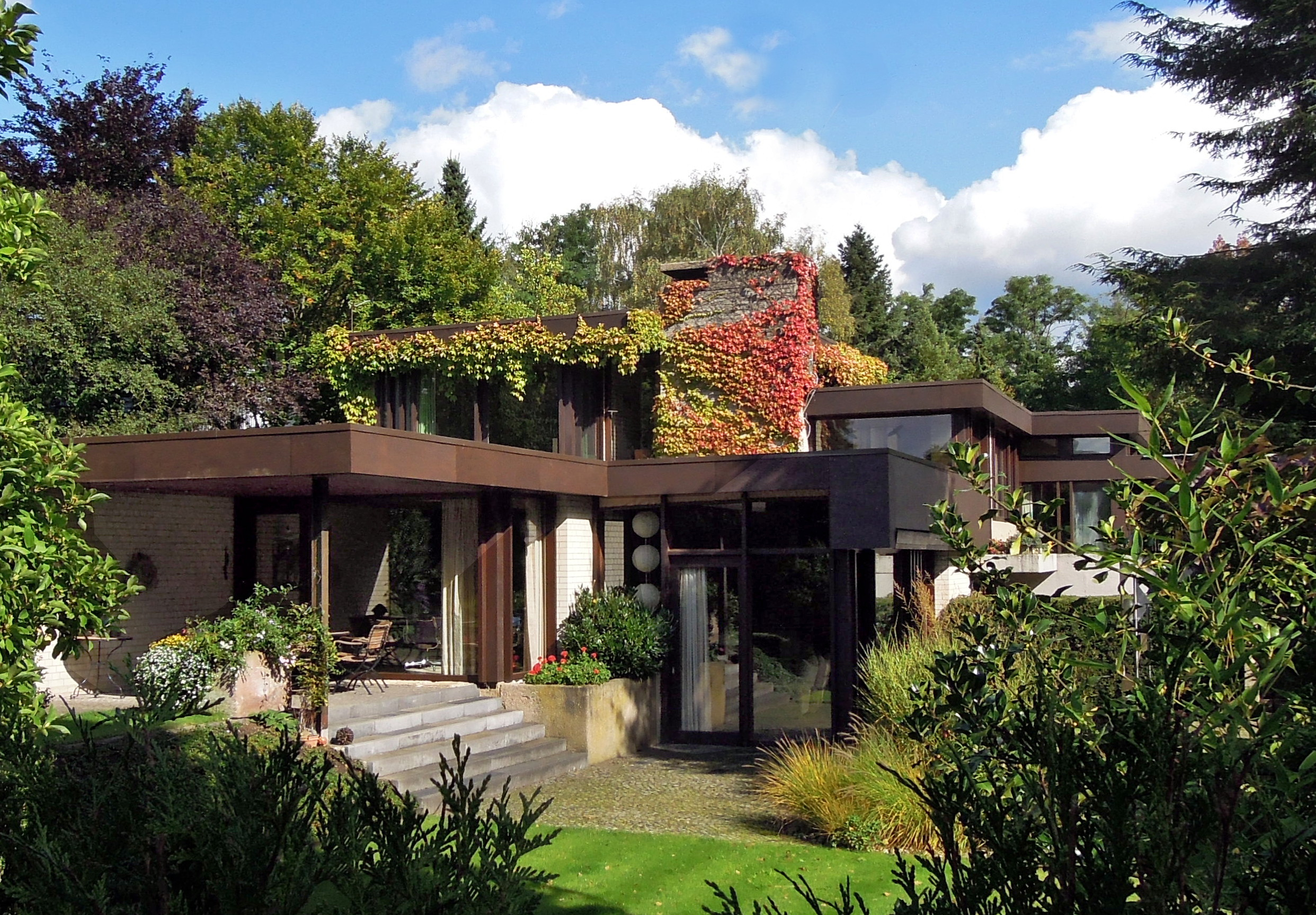 Am Fischerberg 44, Wohnanlage Dr. Papst-Haasper, (oder evt. Werner Pabst) 1975-76 von Karl Hanus (Einzeldenkmal) Siehe auch: Künstlerlexikon Saar: Hanus, Karl und